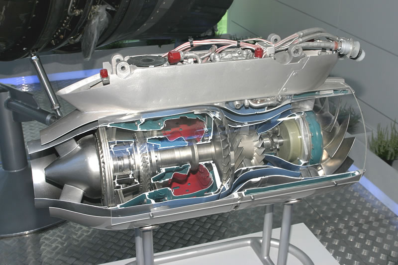 Препарированный двигатель (фото сделанно на выставке «МАКС-2005»)